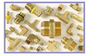 Cu-Zn aleazioa